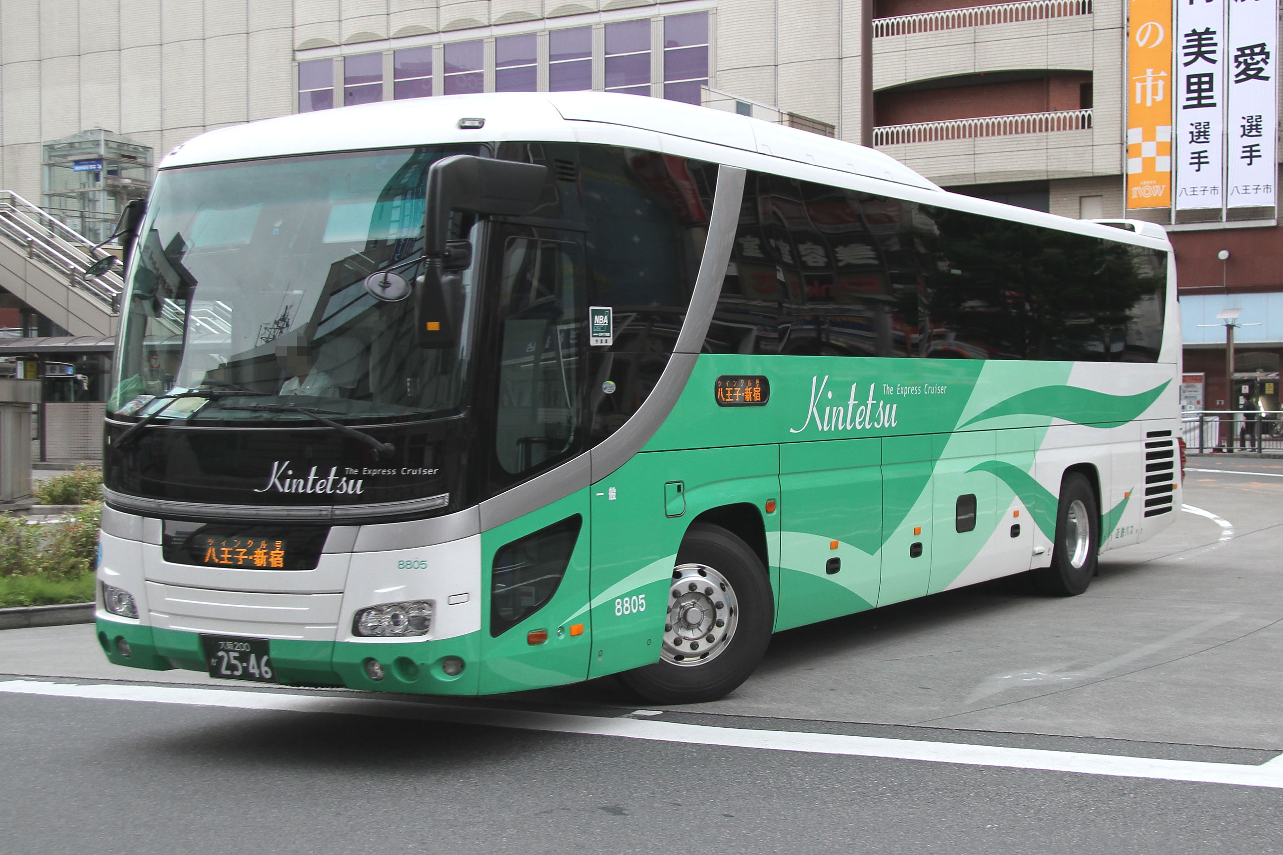 Kintetsu Bus midnight express car (Shinjuku - Hachioji - Osaka Line "Twinkle-go") 近鉄バスの夜行高速路線車両（新宿 - 八王子 - 大阪線「ツィンクル号」）